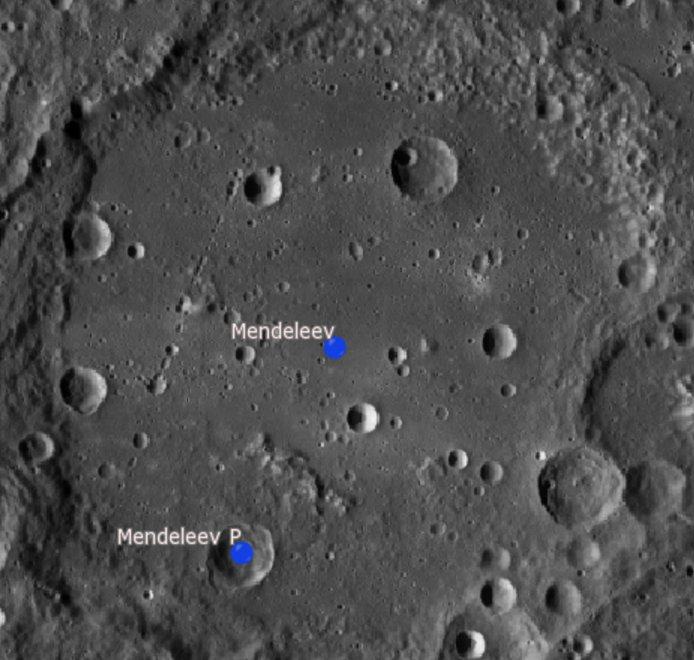 Cráter lunar Mendeleev. Cráteres satélite. (Imagen LRO)